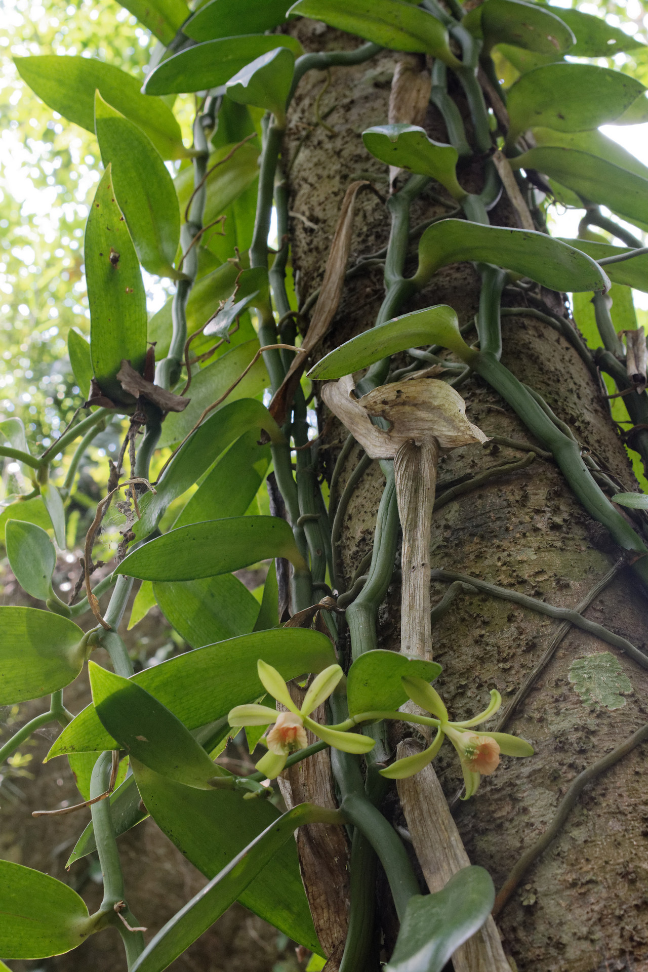 Vanilla somae